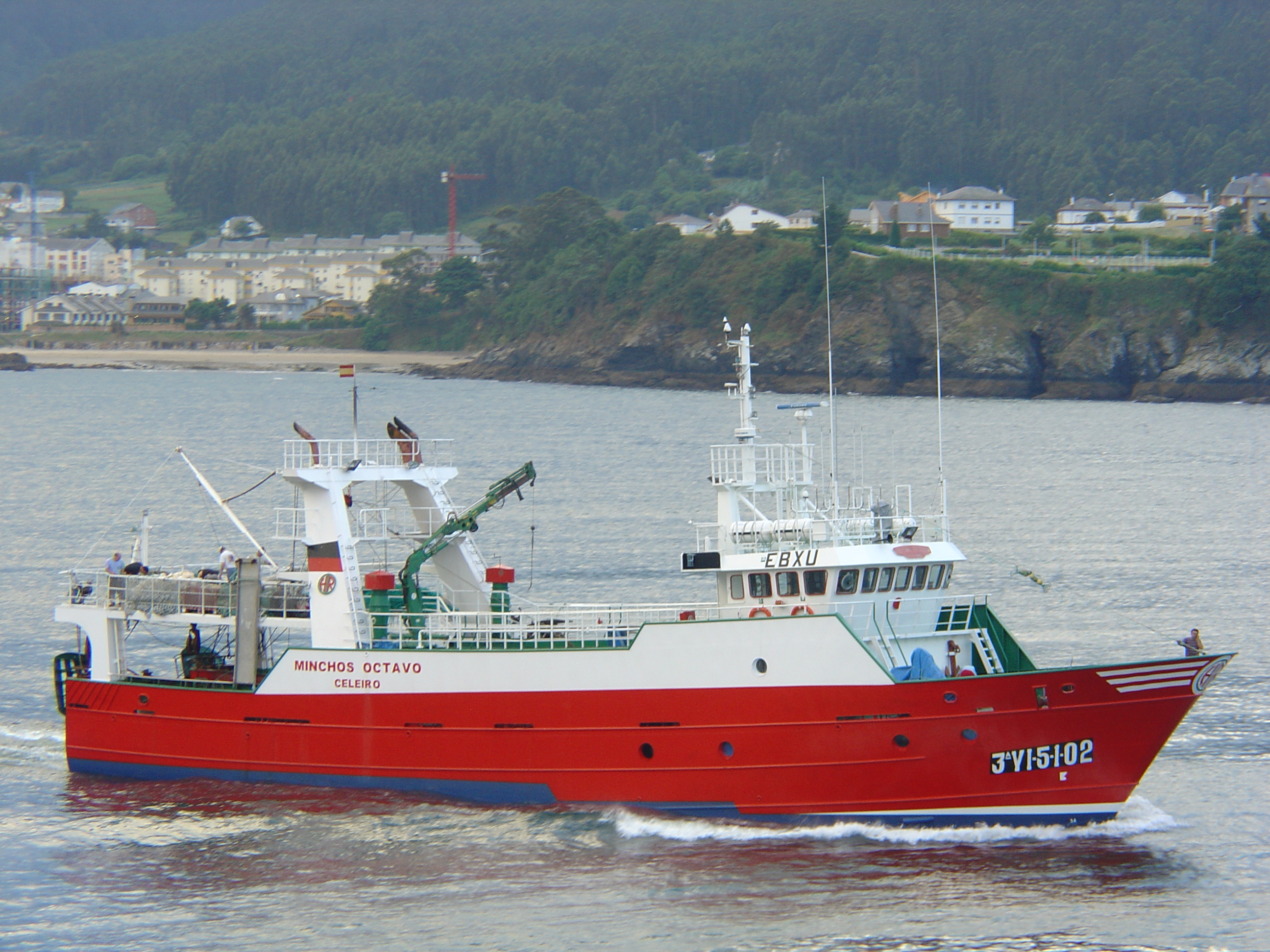 Ficha do Buque Nome do buque Lista Matrícula Folio MINCHOS OCTAVO 3 VI-5 1-02 RBPCAG 2002LU000383 Estado Alta Porto base Celeiro Caladoiro/Tipo de pesca PESQUERIA COMUNITARIA ARRASTRE NEAFC Artes ARRASTRE DE FONDO Ano construcción 2002 Data entrada en servicio 19/06/2002 Arqueo TRB 209,29 Arqueo GT 331,39 Eslora total 35.10 M. Eslora PP 29.50 M. Potencia 586.00 CV. Material casco Aceiro